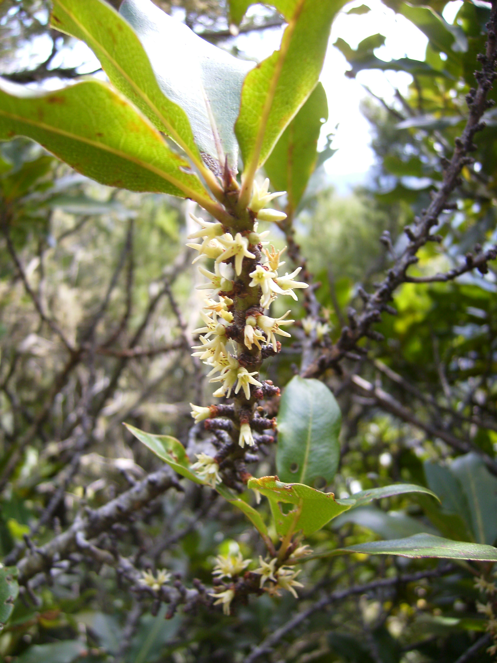 Imagen de Pleiomeris canariensis.